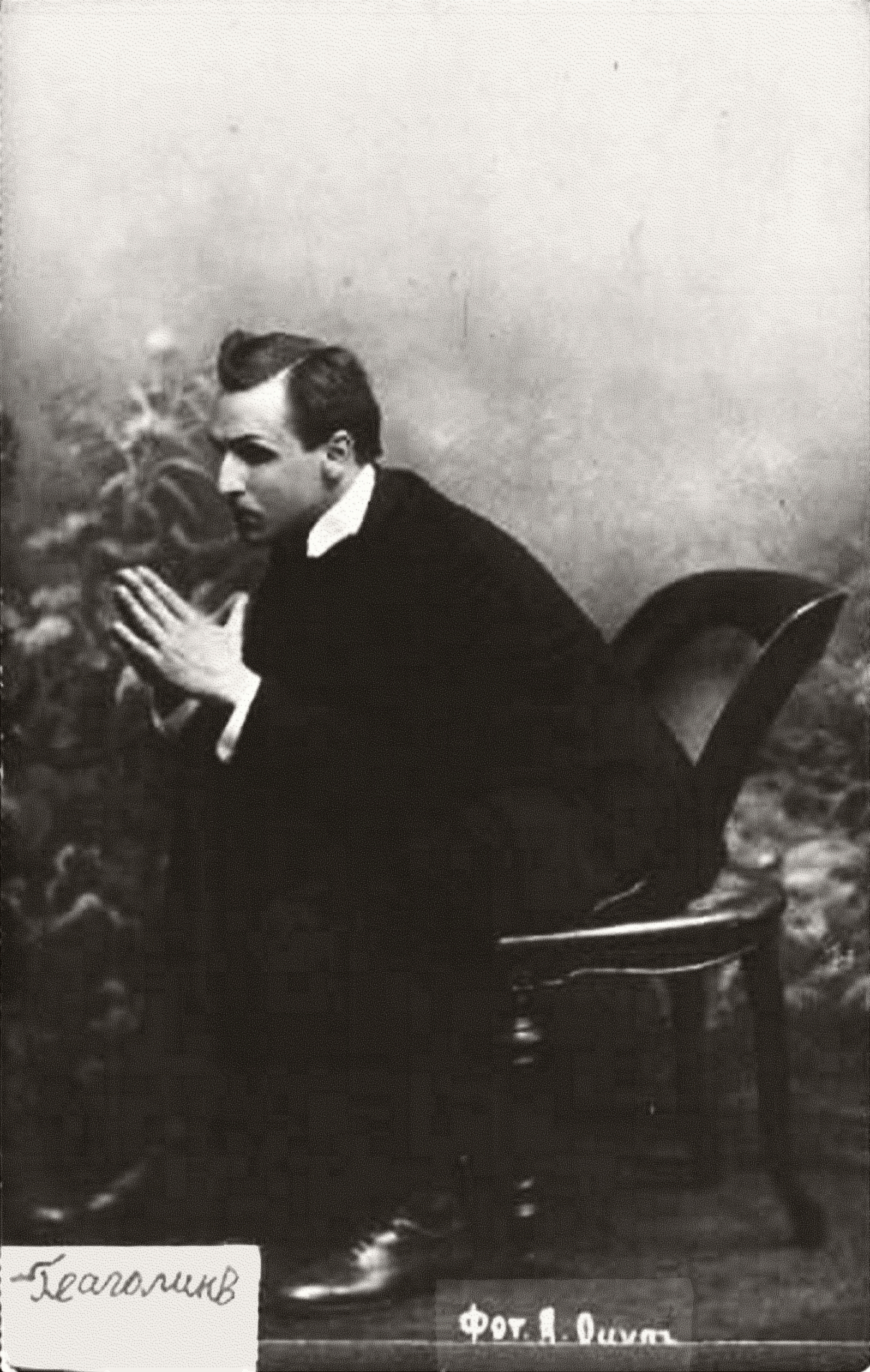 Копия открытки Оцупа Борис Глаголин в роли Шерлока Холмса